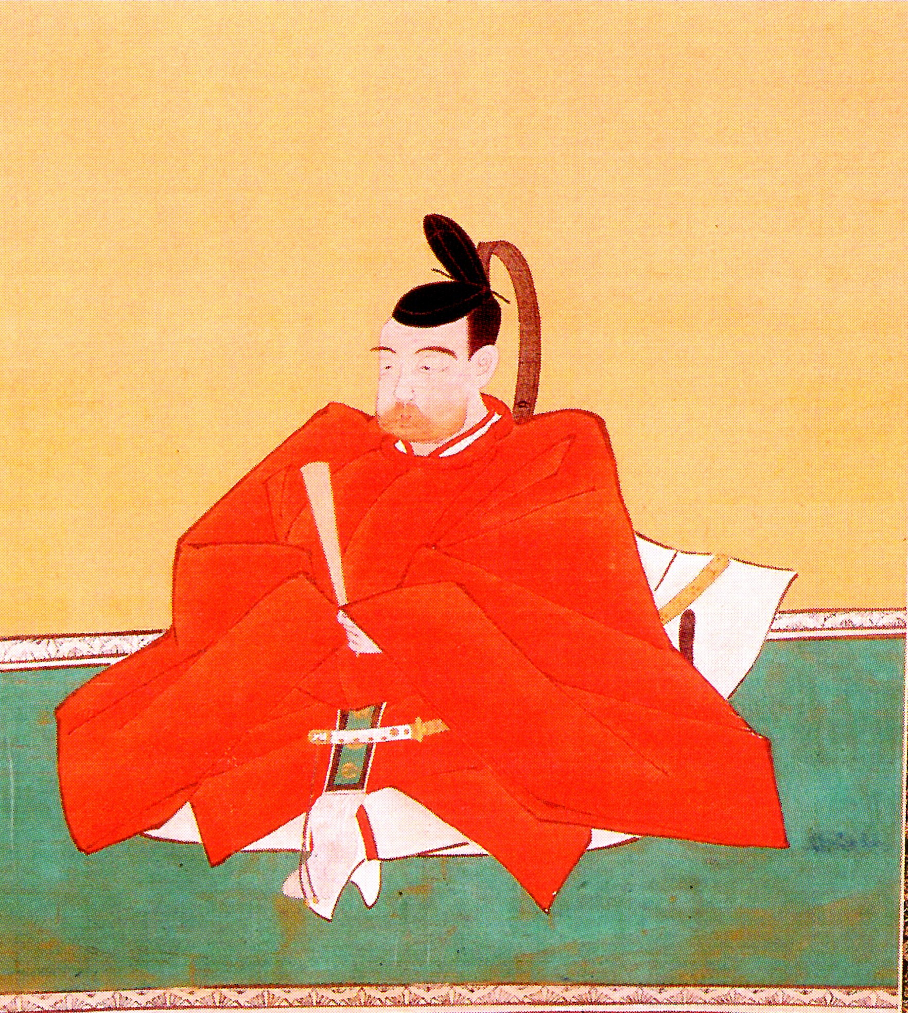 岡部長修の肖像。